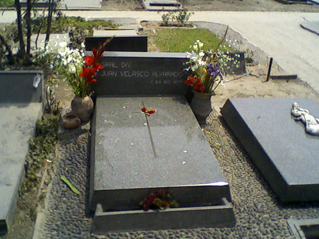 Es una foto de la tumba del general Juan Velasco Alvarado tomada en el cementerio El Angel.